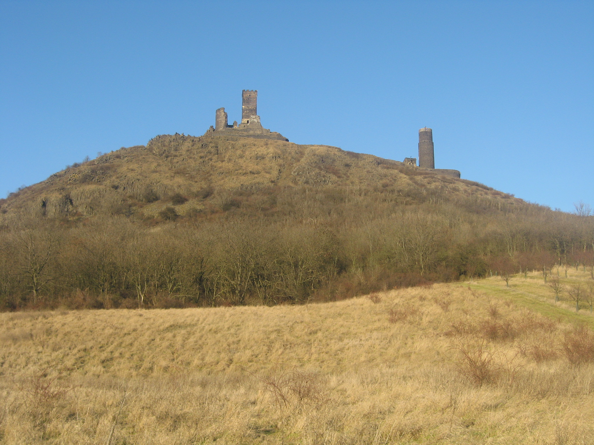 Hazmburk od jihu